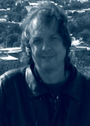 Manuel Mora Morales